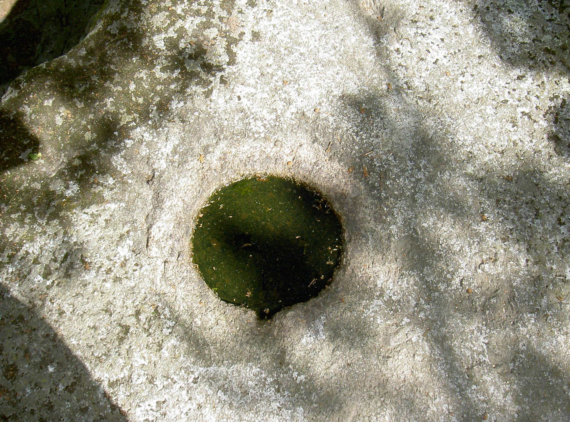 Druidenstein (Kröblitz)